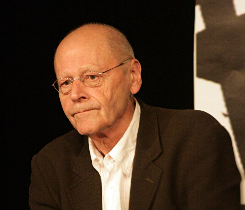 Portrait de Pierre Michon, le 22 septembre 2007 aux « Rencontres de Chaminadour » à Guéret (Creuse, France). Copyright (c) 2007 David Farreny.